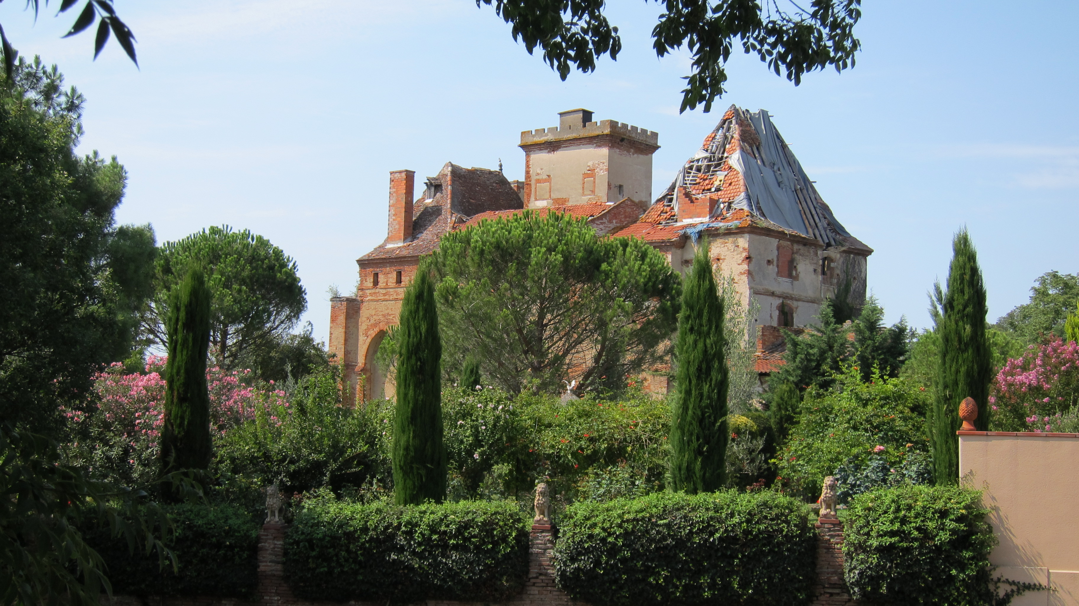 La Salvetat-Saint-Gilles (Haute-Garonne, France) : Le château.